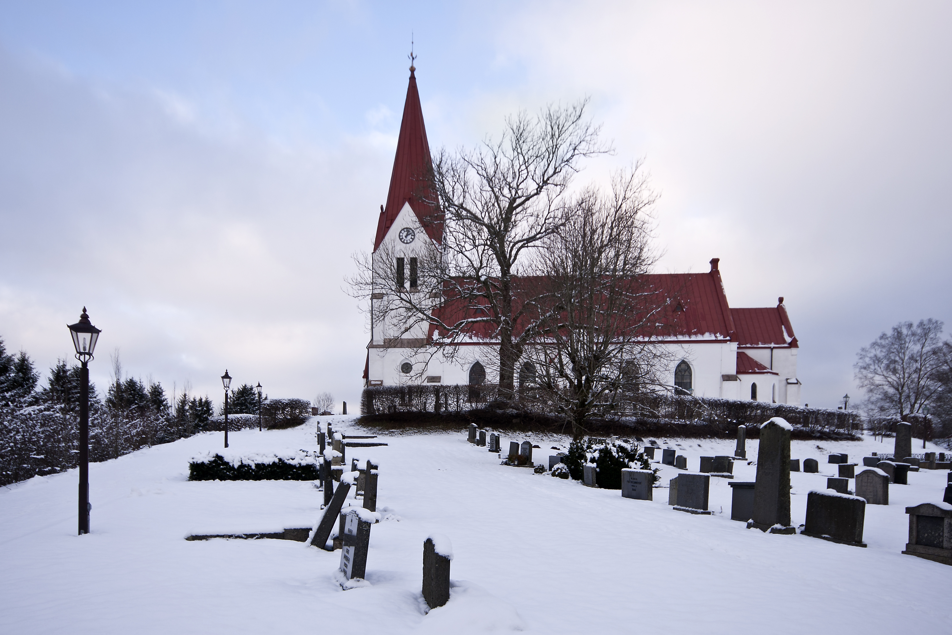 Röke kyrka.